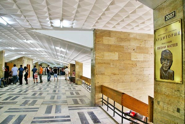 Аудитория "Евгени Матеев"